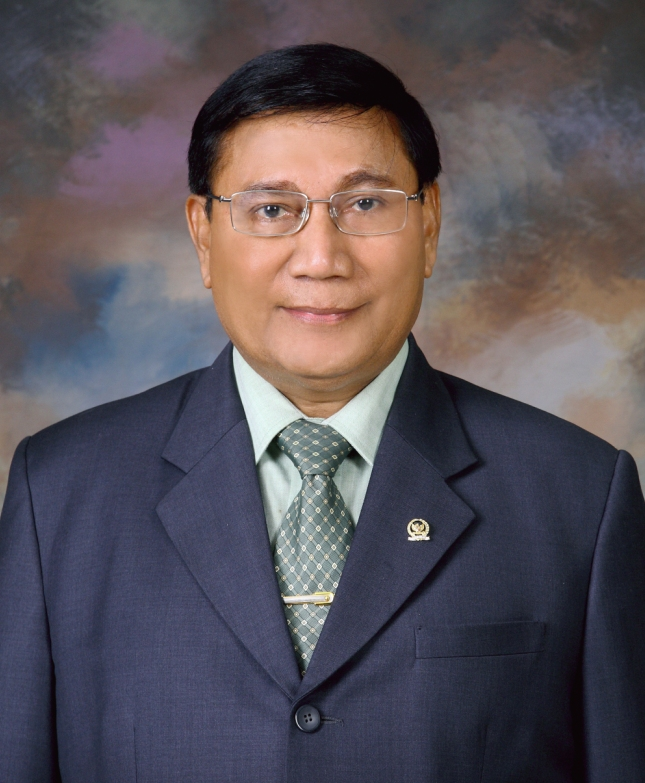 sumber